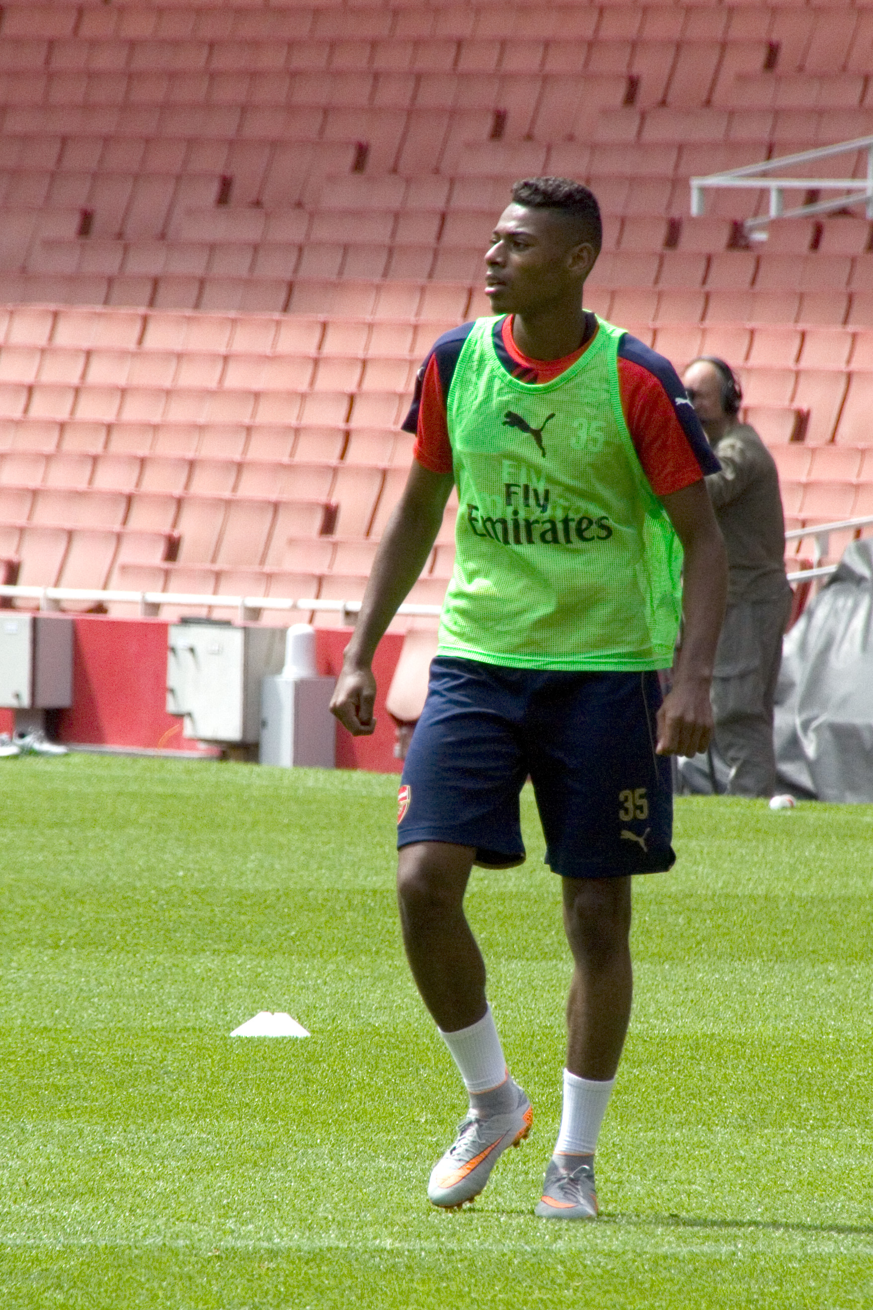 Jeff Reine-Adelaide during 2015 Arsenal Members' Day.